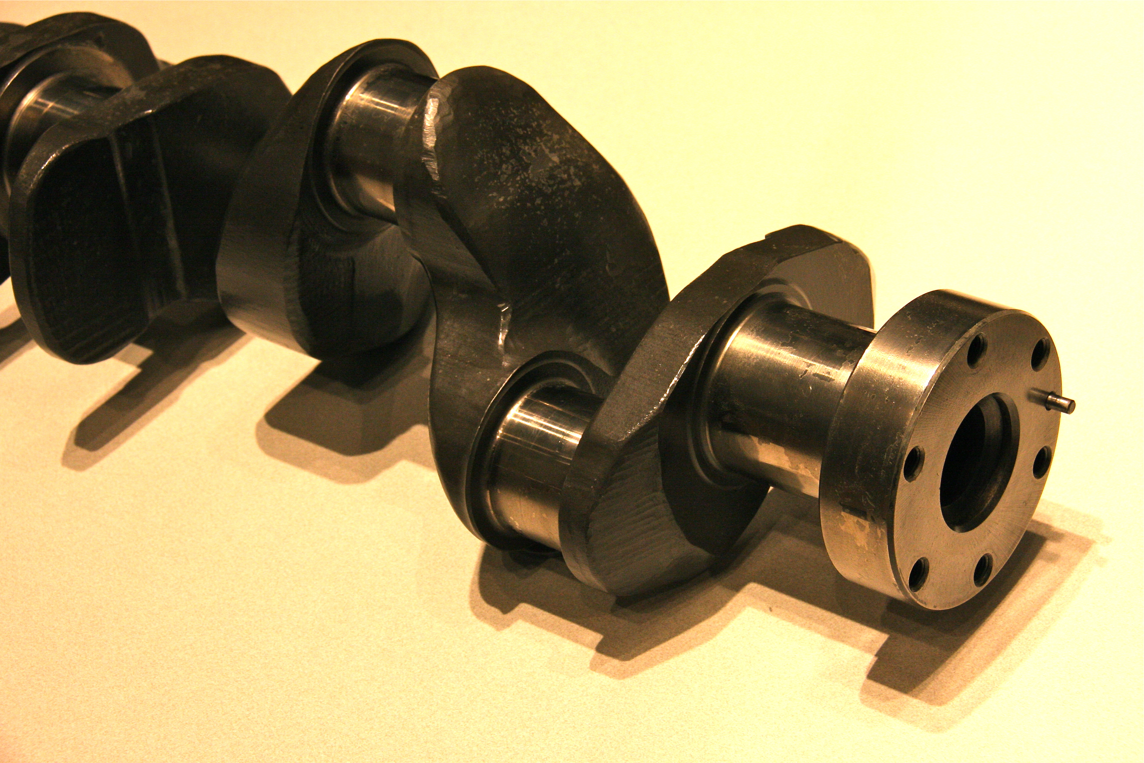 Crankshaft